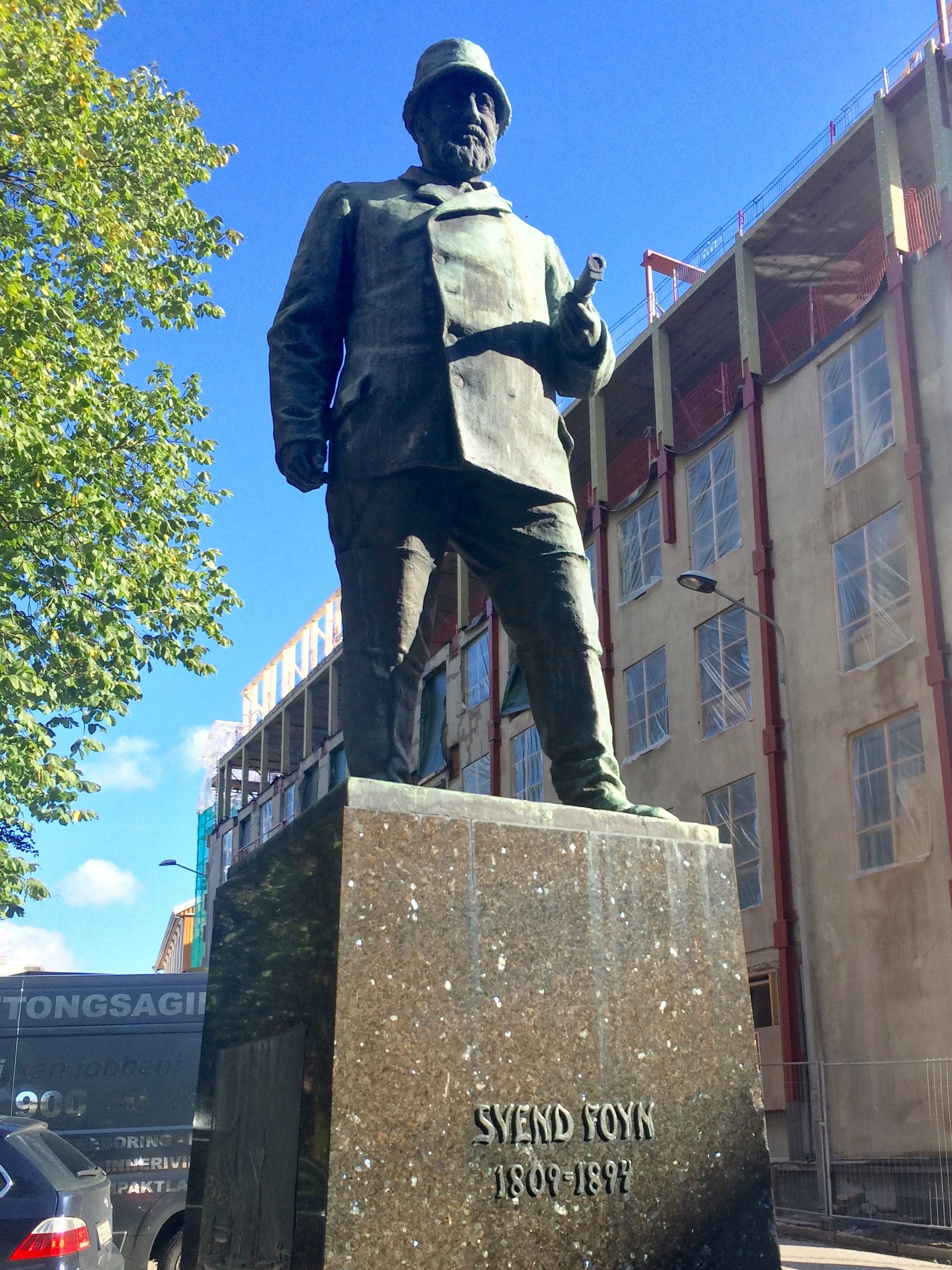 Statue av (1809–1894), grunnleggeren av den moderne hvalfangsten, på Svend Foyns plass ved Tønsberg domkirke i Tønsberg i Vestfold. «Skiænket Tønsberg By av Hvalfangere 1915». Foto 25. september 2015.